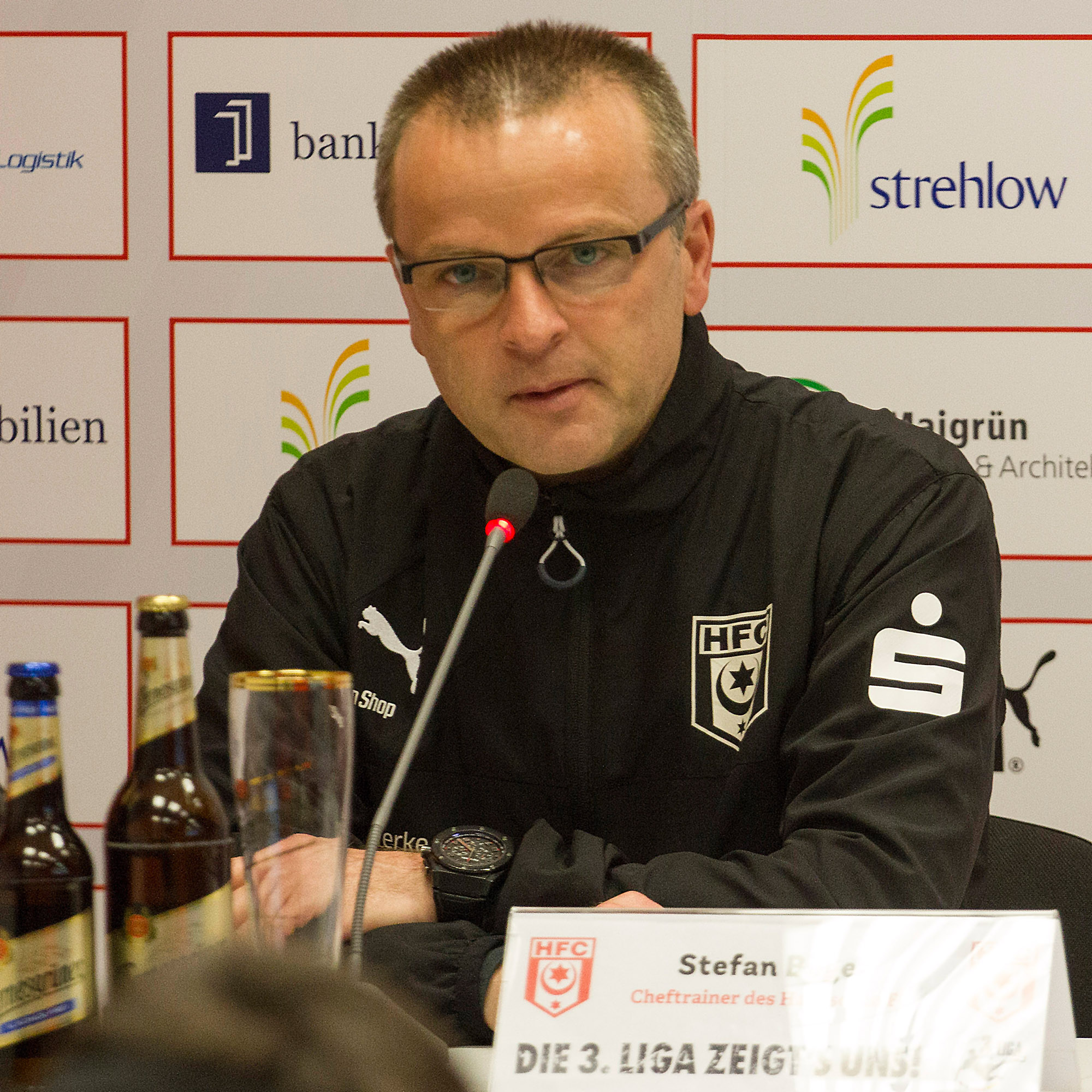 Stefan Böger - 3. Liga 2015/2016 - 22. Spieltag (Hallescher FC - 1. FC Mgdeburg) - Pressekonferenz